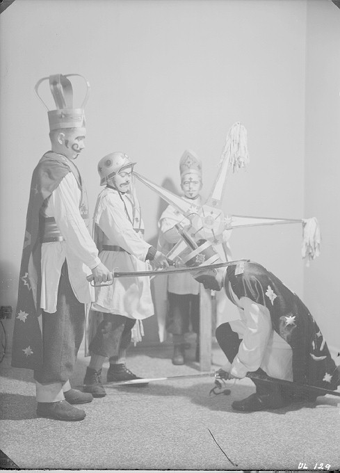 Tiernapoikia vuonna 1946